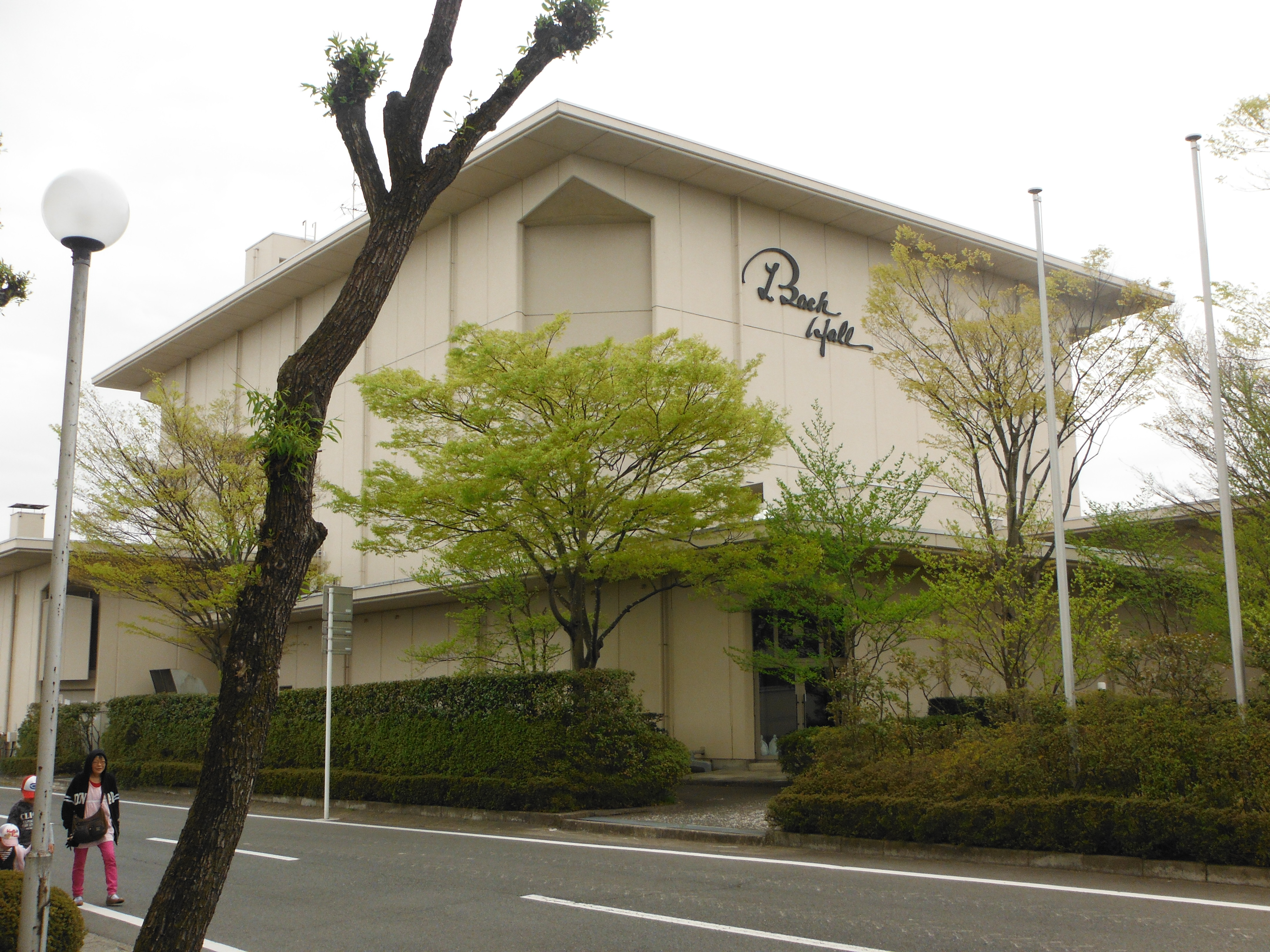 バッハホールの正面玄関